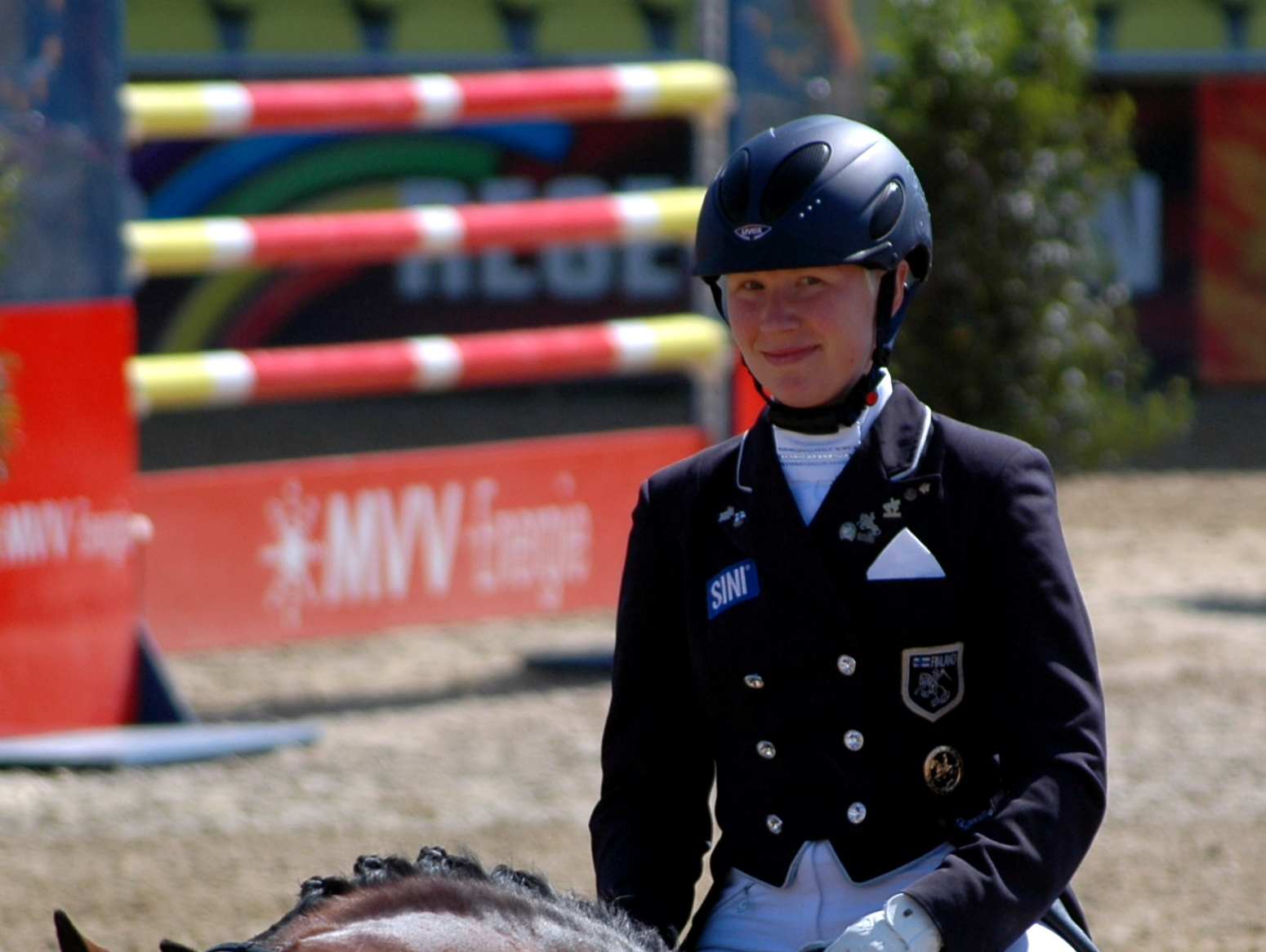 51. Maimarkt-Turnier: Emma Kanerva